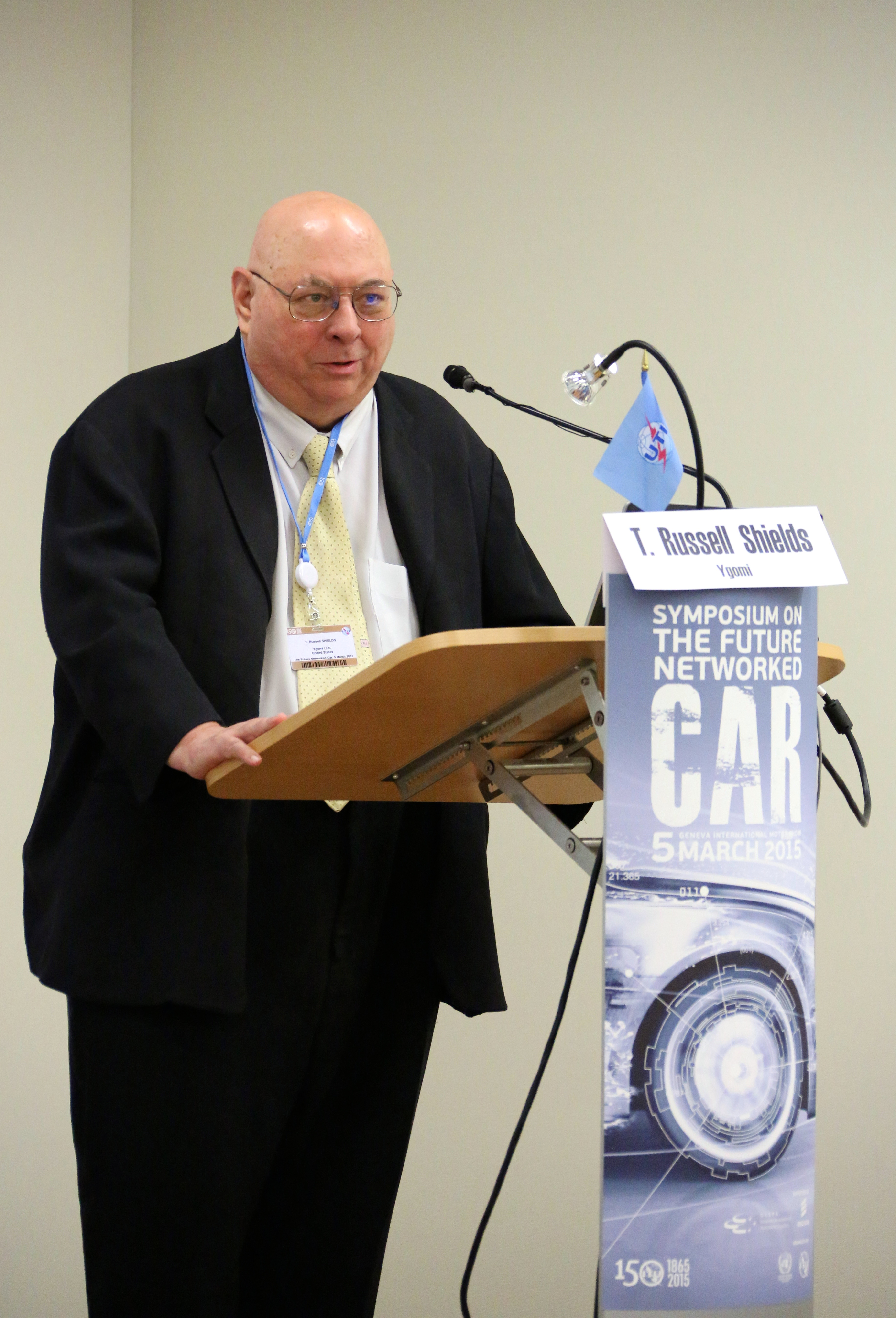 T. Russell Shields